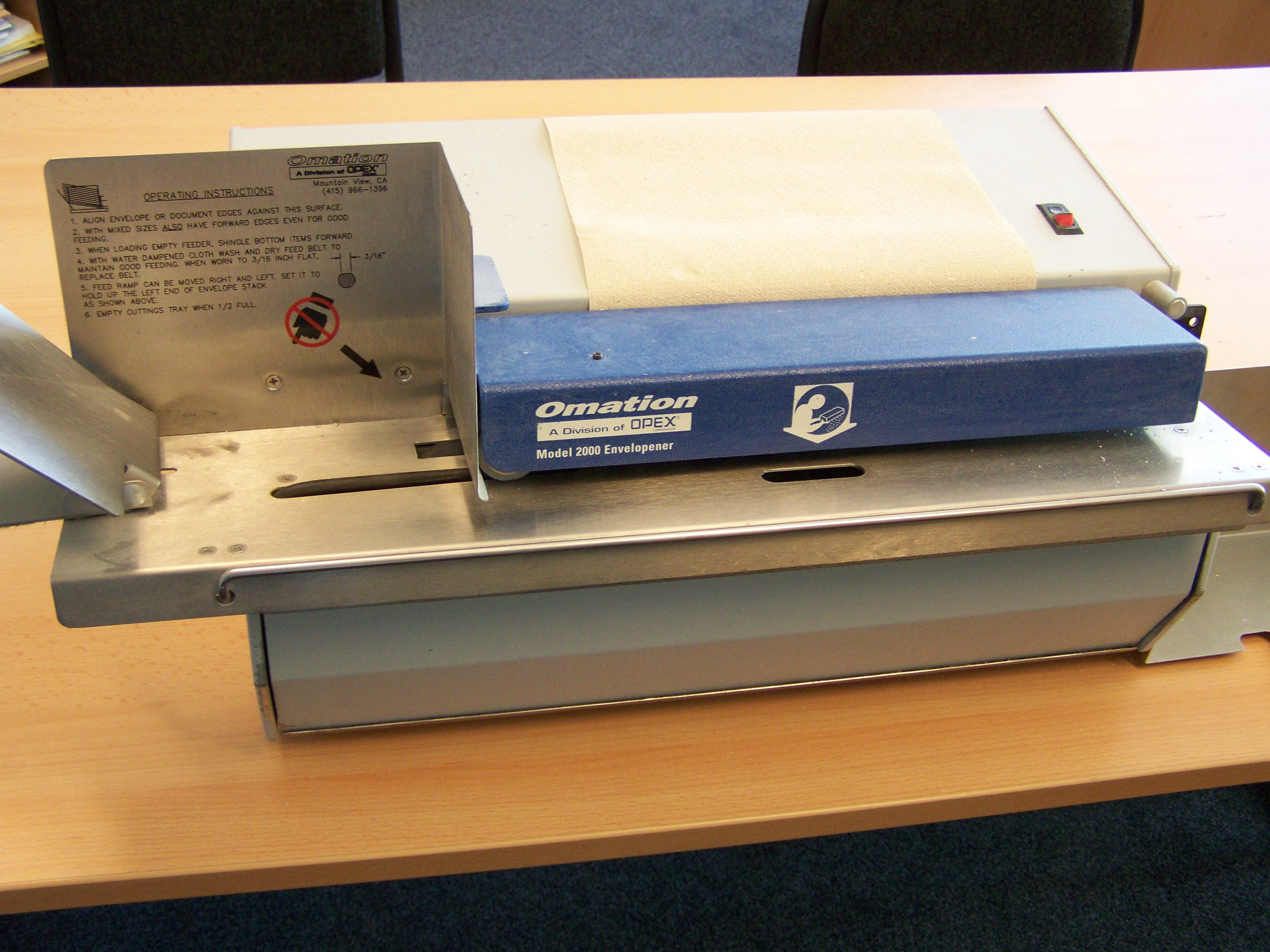 Elektrischer Brieföffner OMATION 2000 Envelopener